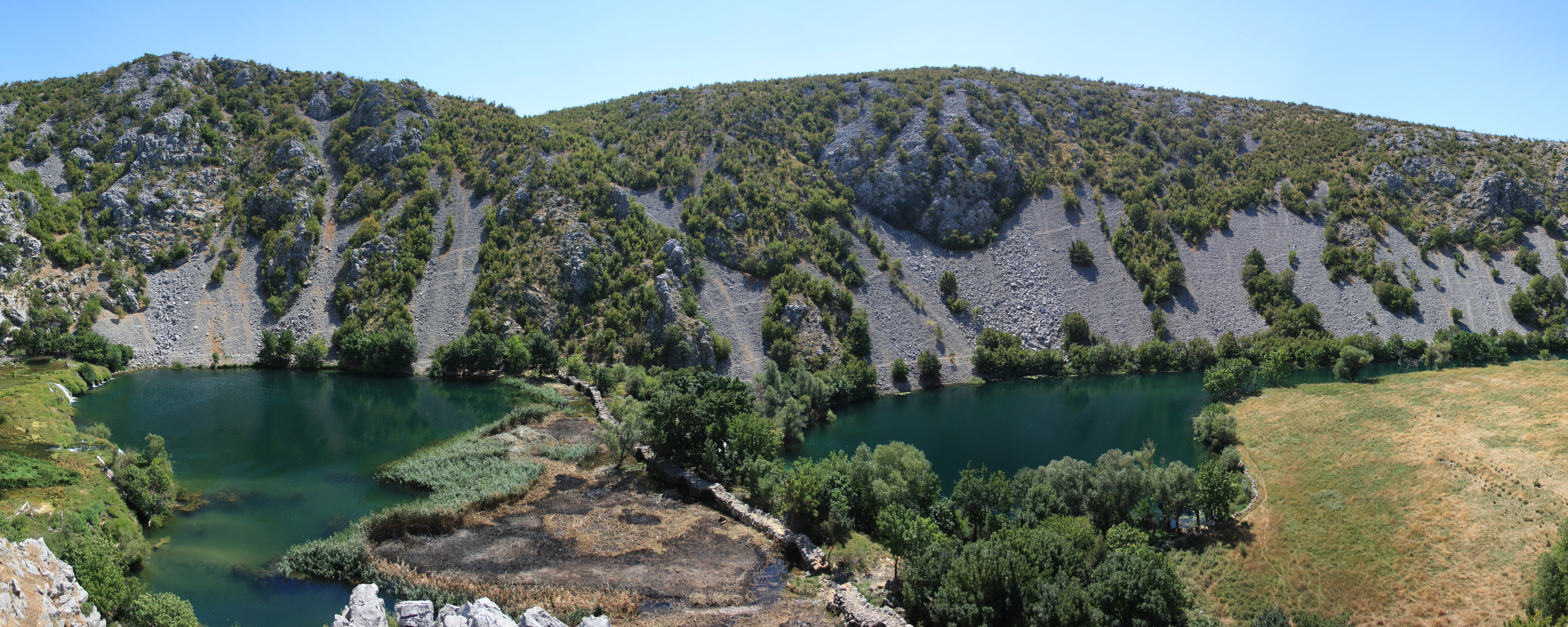 Kudin most